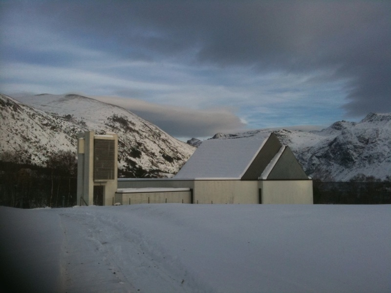 Bilete av Berle Kyrkje teke frå gravplassen